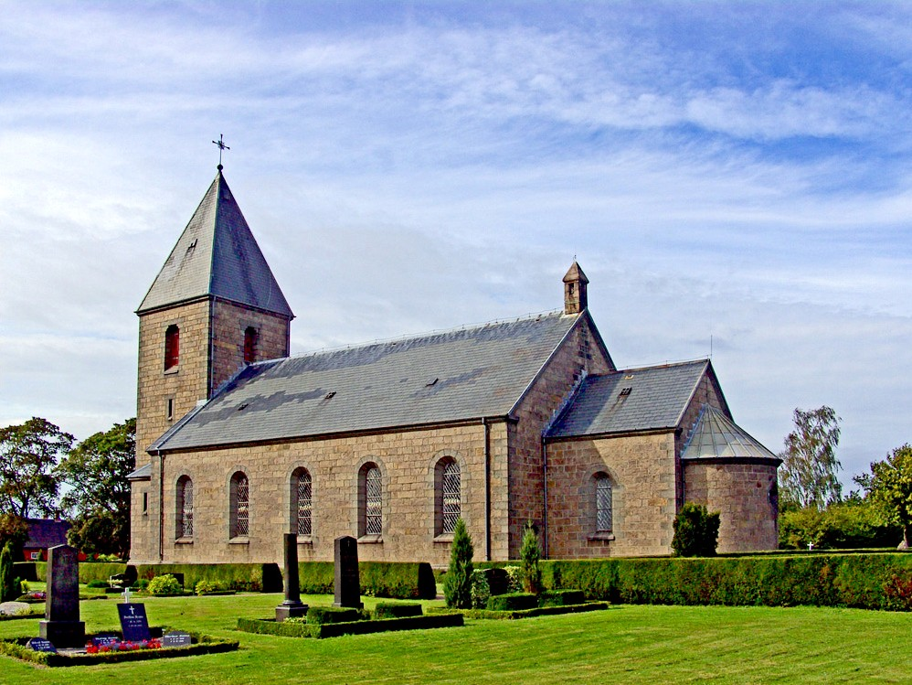 fra sydøst